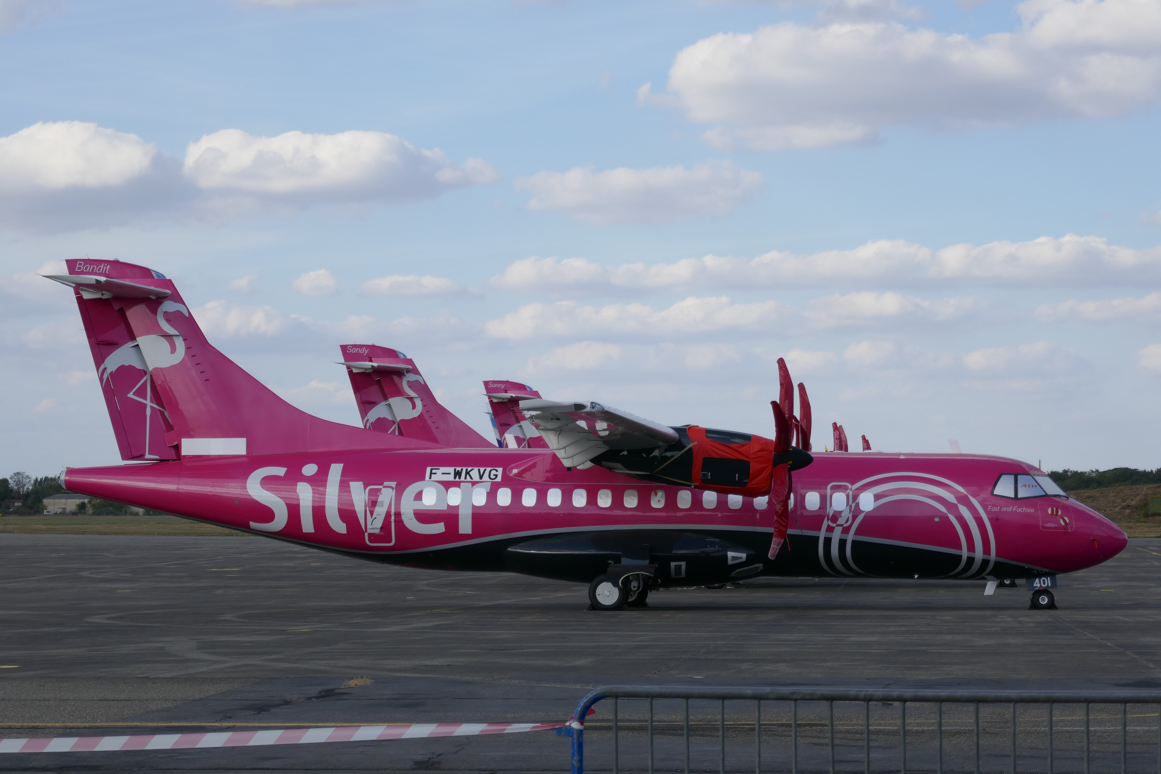 ATR 72-600 de la compagnie Silver Airways. Aérodrome de Toulouse Francazal (LFBF) le 30 septembre 2018.